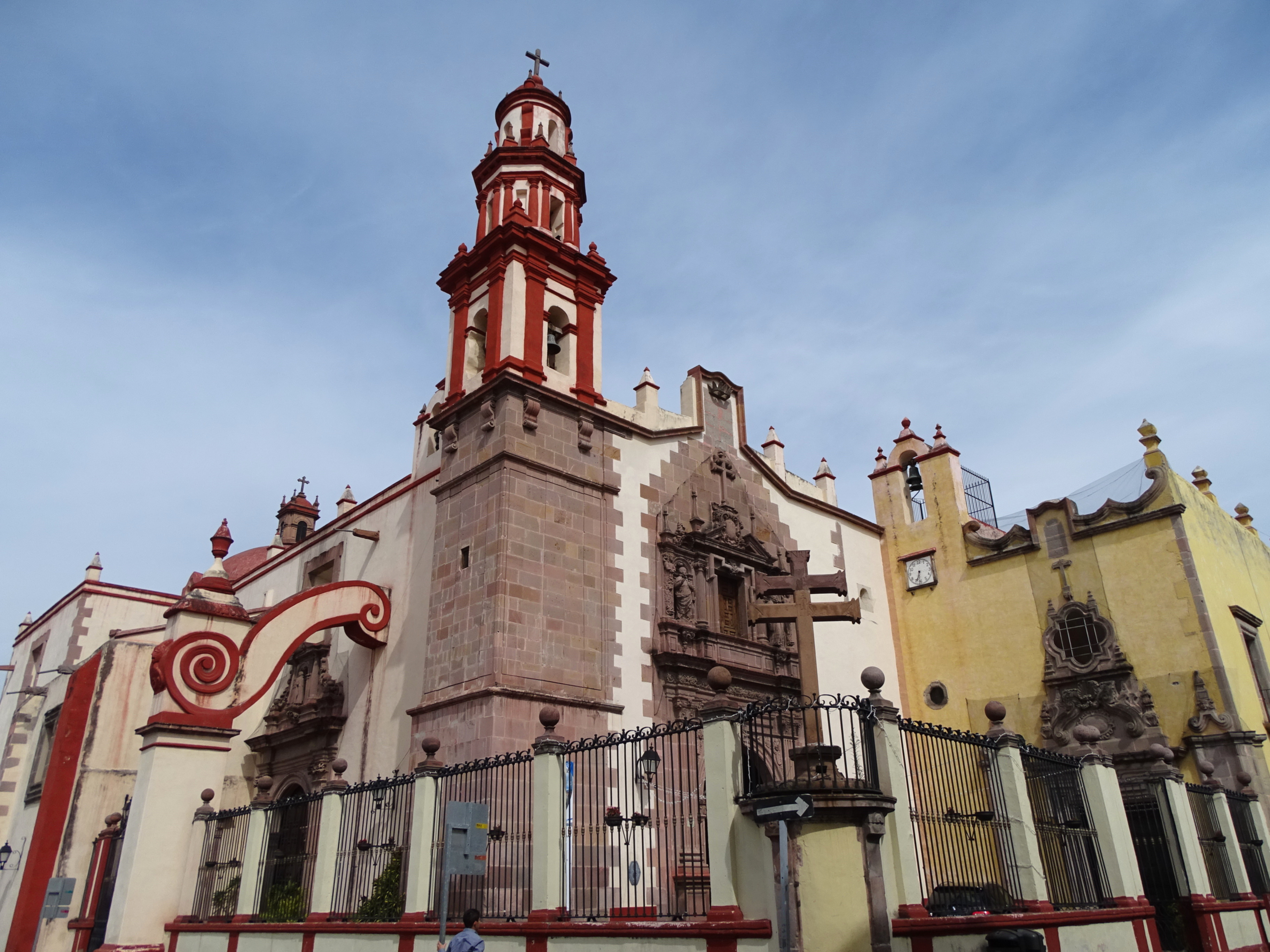 Parroquia de Santiago - Queretaro - Mexico